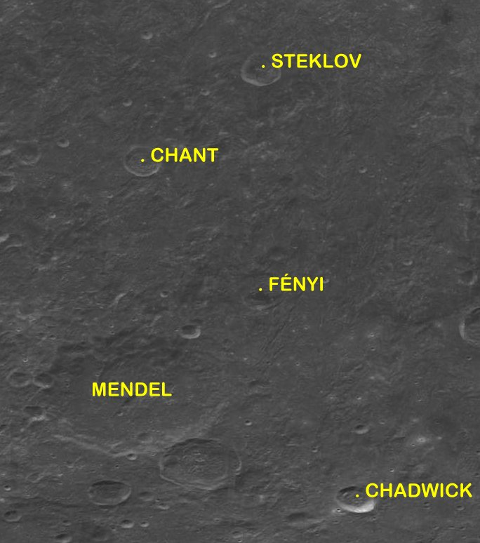 Cráter lunar Fényi. Localización. (Imagen Misión Clementine)